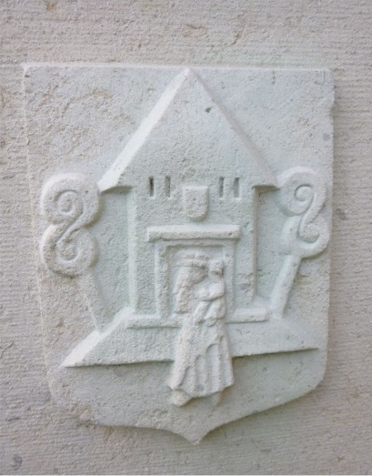 Oorlogsmonument Schaesberg. (Witranden van originele afbeelding zijn verwijderd.)